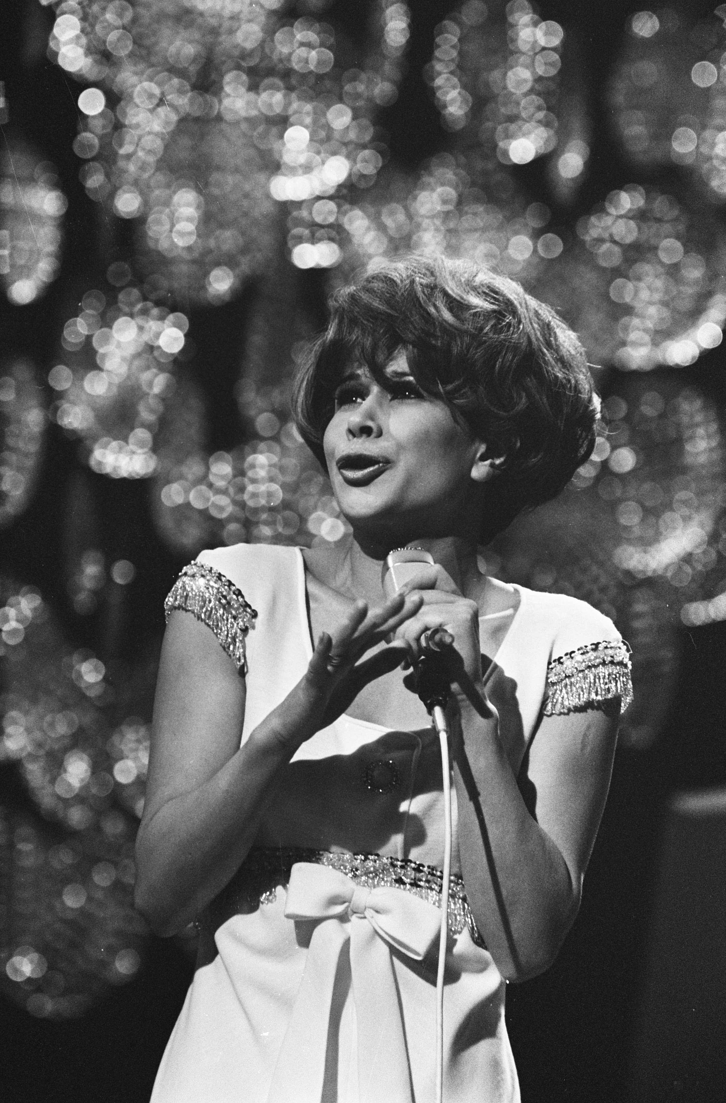 Collectie / Archief : Fotocollectie Anefo Reportage / Serie : [ onbekend ] Beschrijving : Nationale finale van het Eurovisie Songfestival in Scheveningen nr. 27 , 28: Anneke Gronloh , nr. 29 , 3 Datum : 26 februari 1969 Locatie : Scheveningen, Zuid-Holland Trefwoorden : SONGFESTIVALS, finales Persoonsnaam : Grönloh, Anneke Fotograaf : Koch, Eric / Anefo Auteursrechthebbende : Nationaal Archief Materiaalsoort : Negatief (zwart/wit) Nummer archiefinventaris : bekijk toegang 2.24.01.05 Bestanddeelnummer : 922-1428